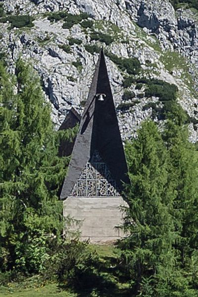 Katholische Filialkirche Hl. Dreifaltigkeit auf der Tauplitzalm von Süden gesehen